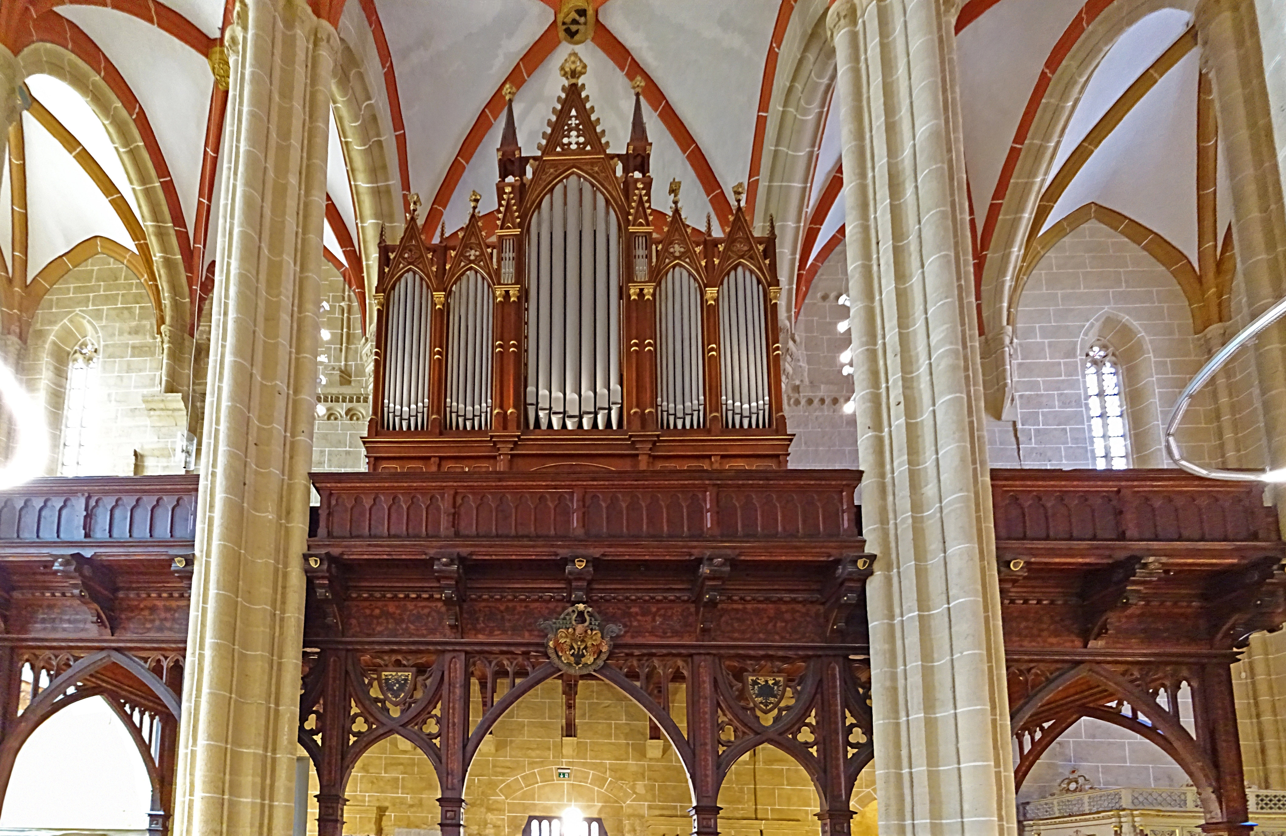 Orgel-Empore in der Marienkirche (Mühlhausen)